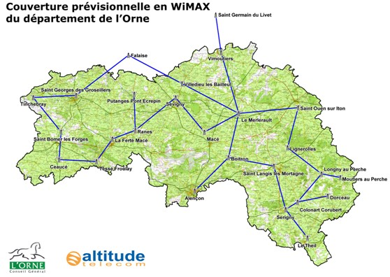 Carte de couverture du Wimax dans l'Orne